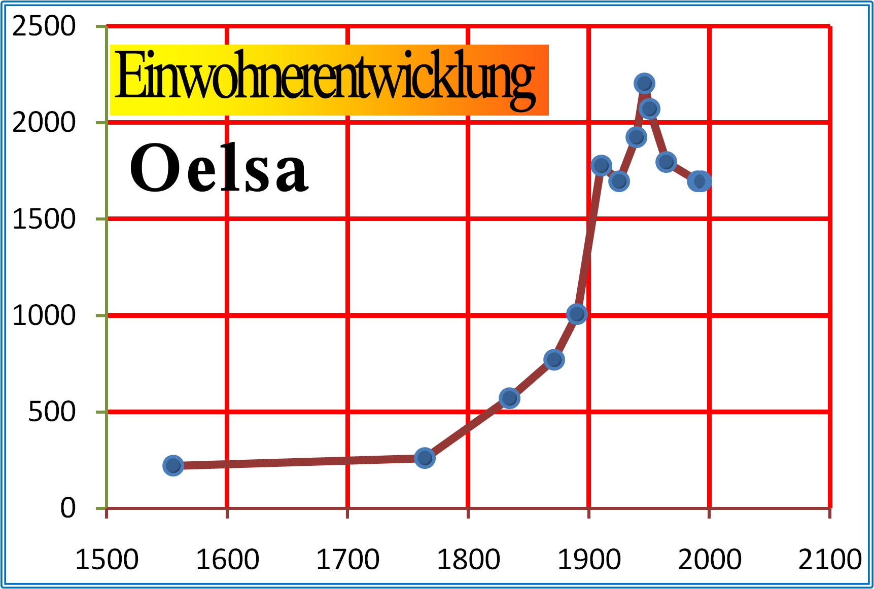 Das Diagramm stellt die Entwicklung der Einwohnerzahl in der Gemeinde Oelsa in Sachsen dar. Dabei wurden die Einwohnerzahlen von Klein- und Großölsa zusammen bewertet, um den Anschluss an die Zahlen des Gemeindezusammenschlusses ab 1939 vergleichbar zu machen. Bei diesen Angaben handelt es sich um den Ort Oelsa bei Rabenau im jetzigen Weißeritzktreis.